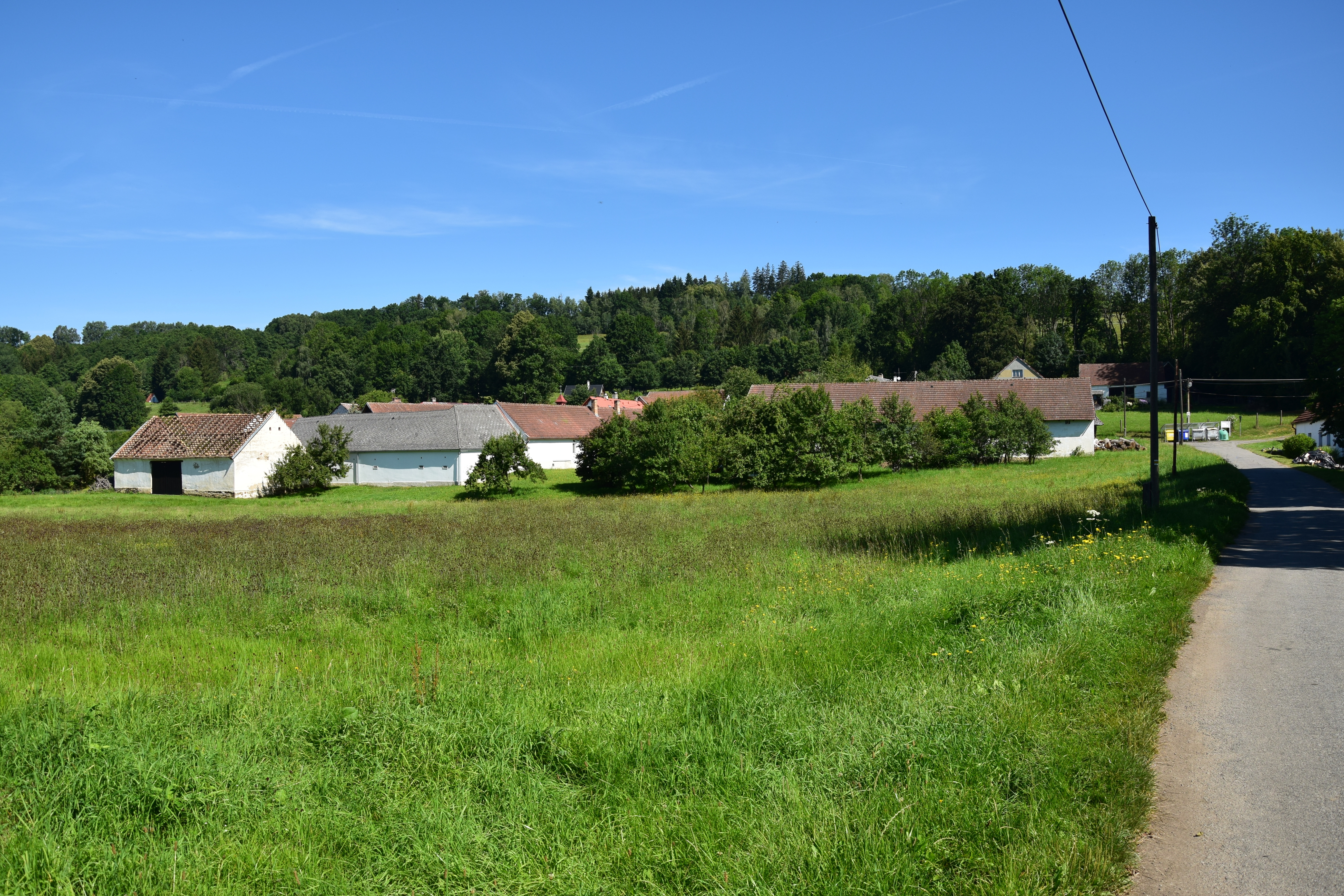 Sudkův Důl – Jádro vesnice od rybníka